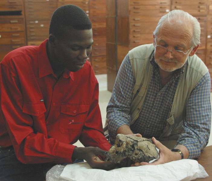 Paläoanthropologe Michel Brunet und sein Assistent mit dem Schädel des Sahelanthropus Tschadensis (Miozän)